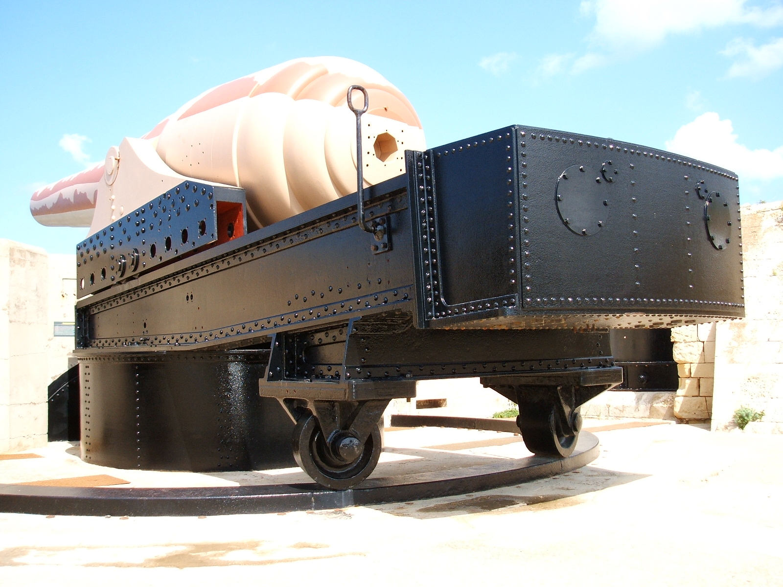 Das Bild zeigt die größte Frontlade-Kanone der Welt, die jemals erbaut wurde. Sie steht auf der Insel Malta in der Stadt Kalkara in der ehemals britischen Festung Fort Rinella (erbaut 1878).